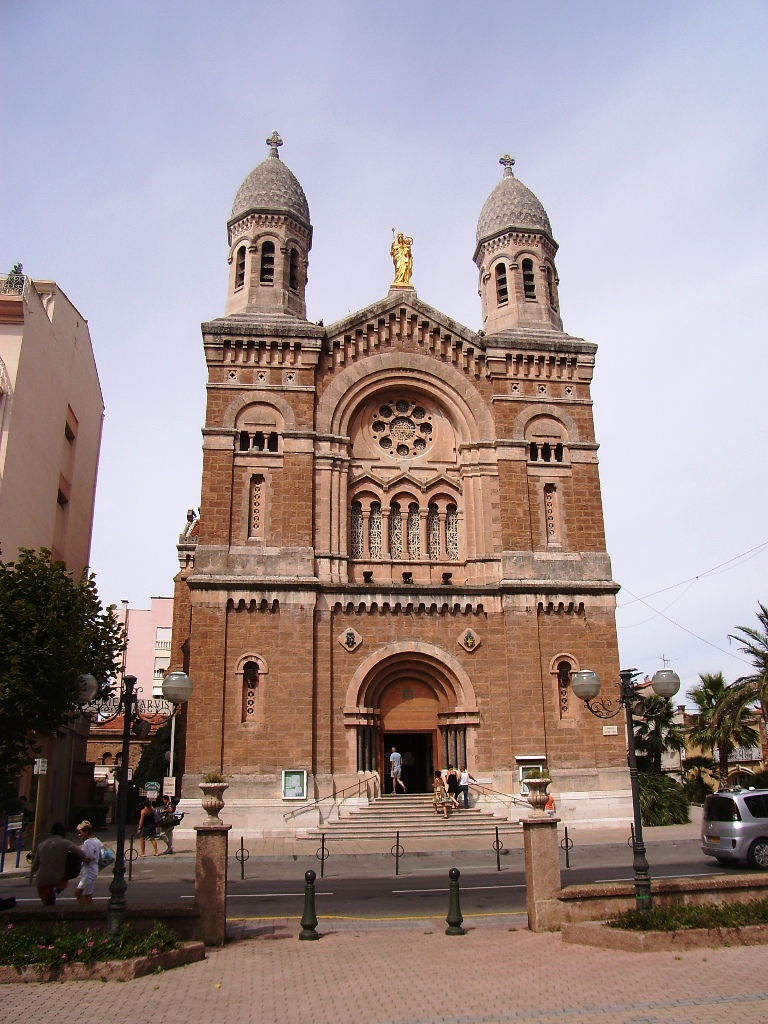 Basilique Notre-Dame-de-la-Victoire de Saint-Raphaël (83)